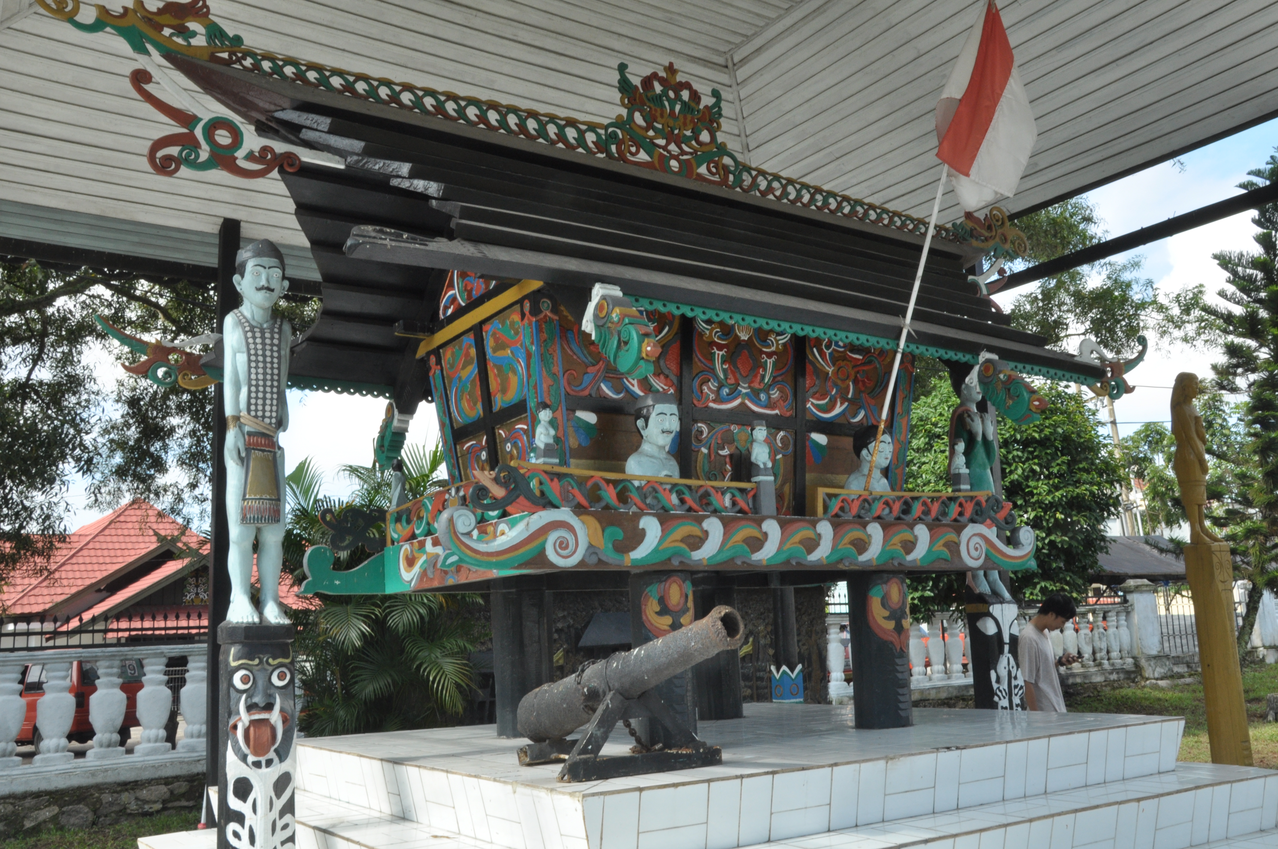 Sandung Keluarga Ngabe Soekah di Bukit Ngalangkang